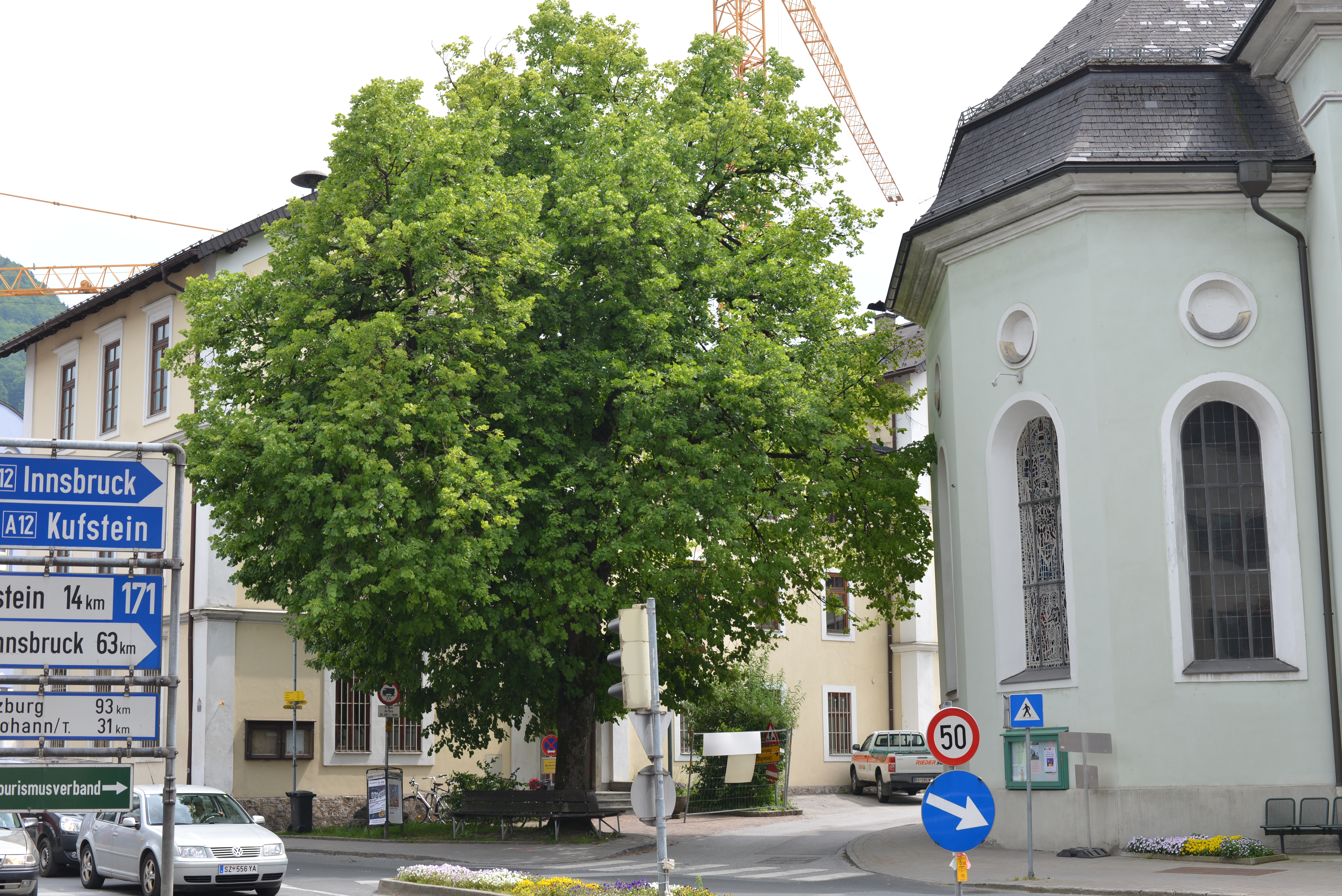 Kaiserjubiläumslinde, vor der Stadtpfarrkirche St. Laurentius zu Wörgl This media shows the natural monument in the Tyrol with the ID ND_5_63.